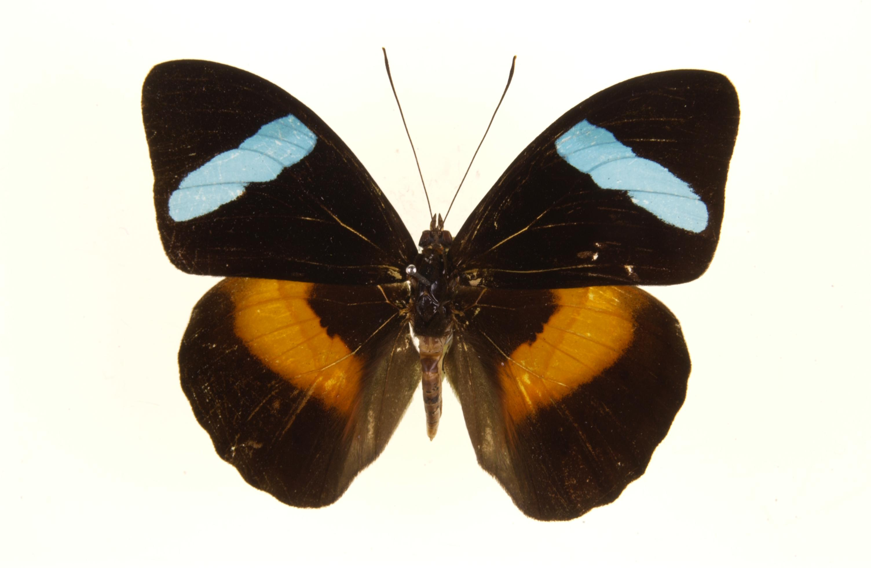 Nessaea obrina Male